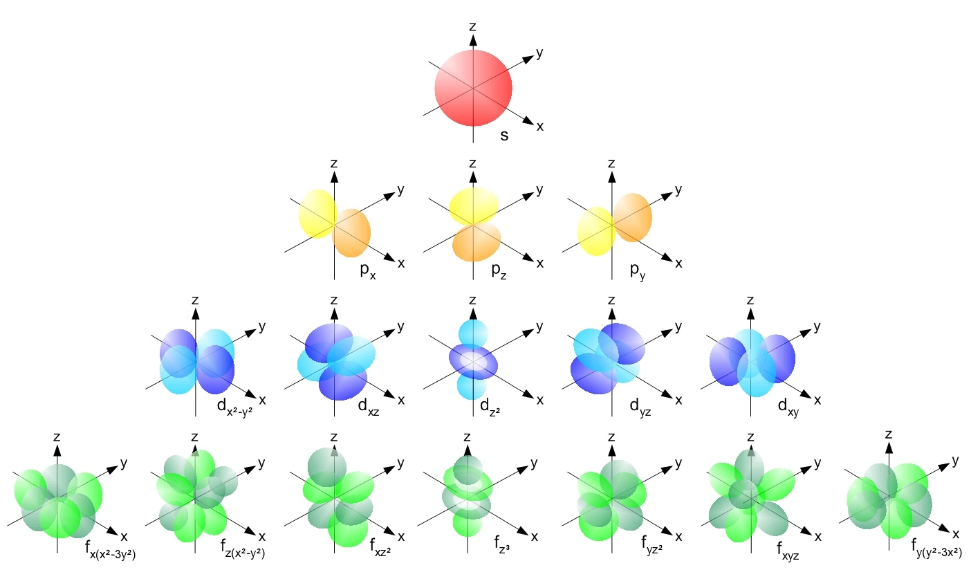 Skisser av formene for ett-elektron s, p,d og f orbitaler[3].